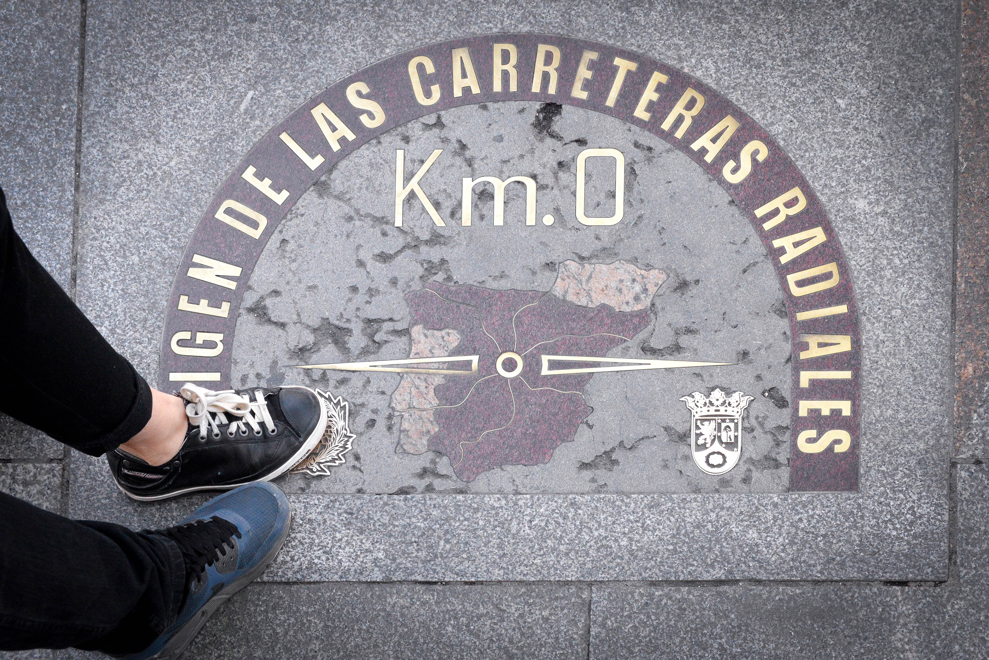 Madrid_-38.jpg